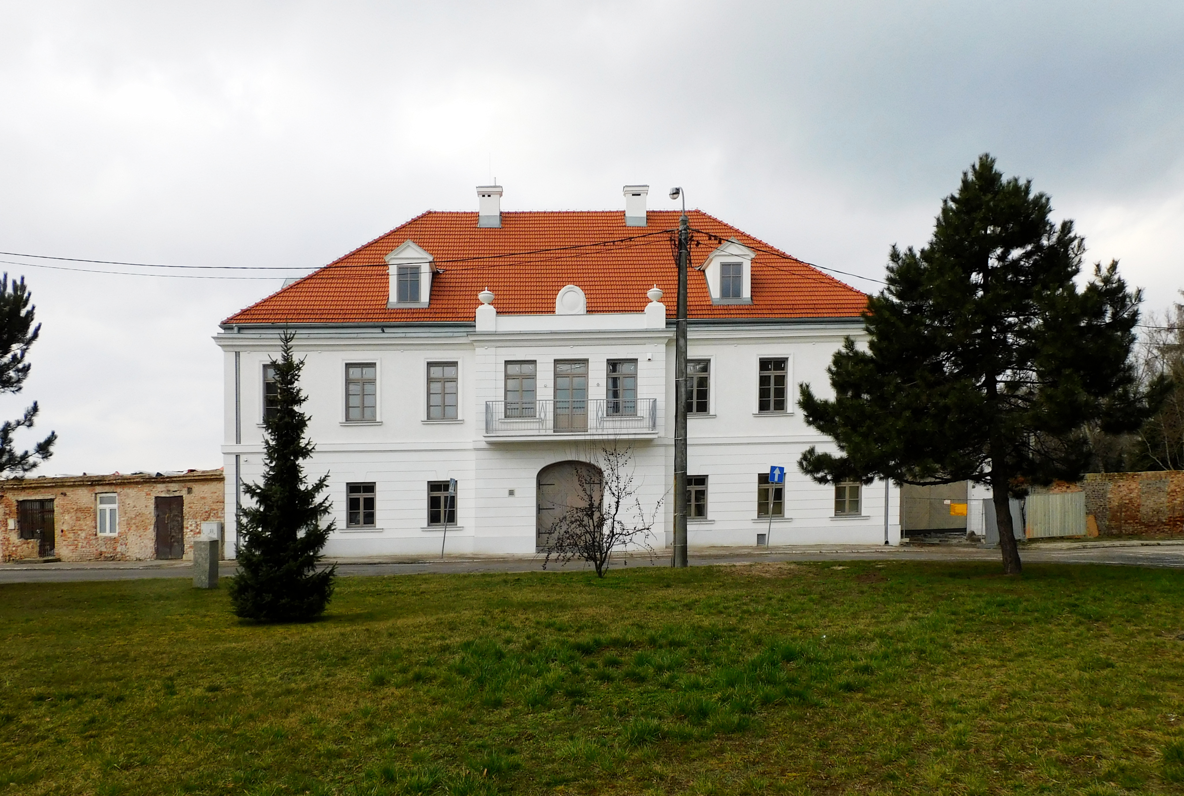 Układ urbanistyczny historycznego centrum Raszyna, dawny zajazd